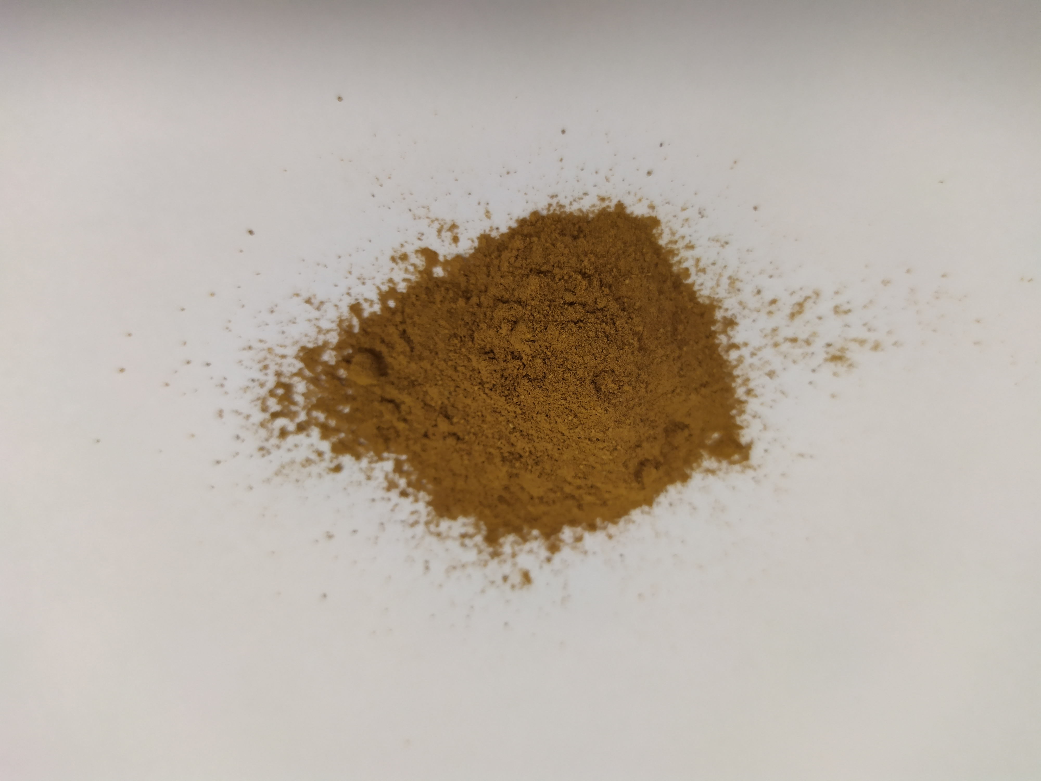 계피 가루, 2019년 6.20. 촬영